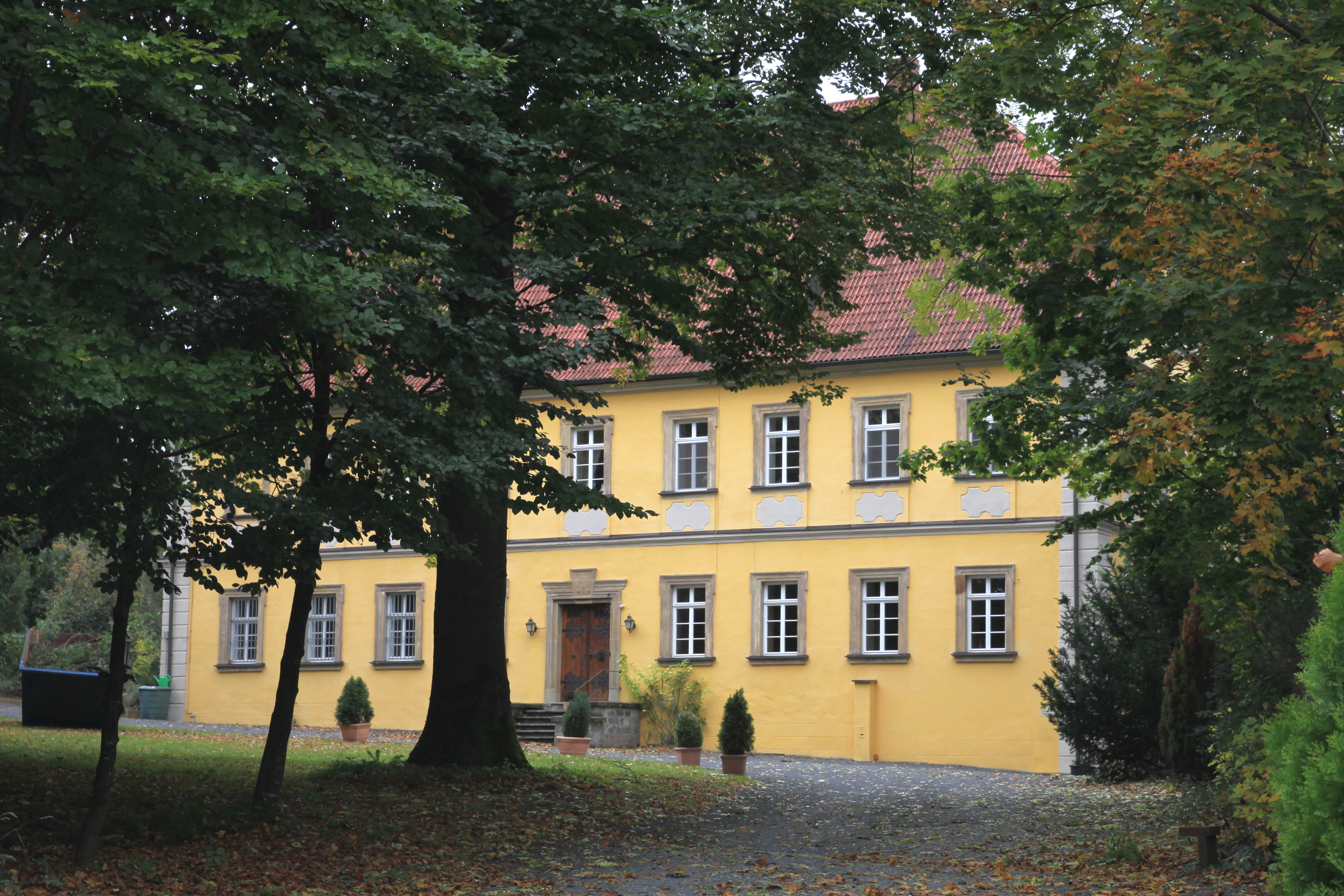 Schloss in Buch am Forst, Lichtenfels